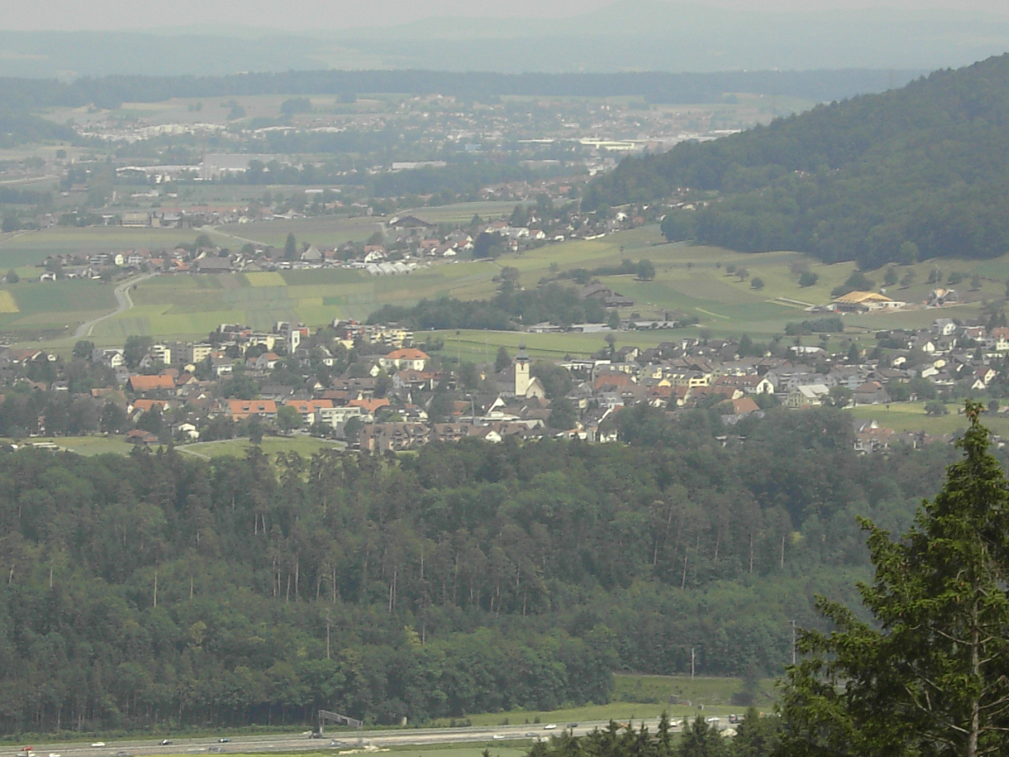 View from Rüsler (ob Neuenhof) to Würenlos AG, Switzerland